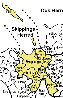 Skippinge Herred Holbæk Amt , Denmark. Map by Svend-Erik Christiansen, edited by user:Nico-dk .